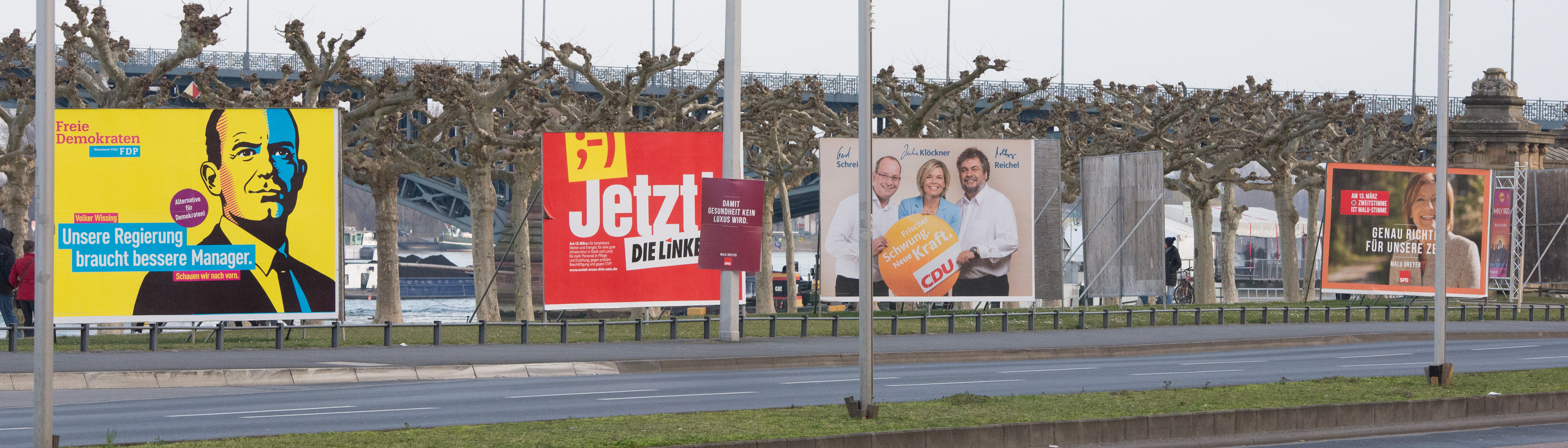 Impressionen am Abend der Landtagswahl in Rheinland-Pfalz am 13. März 2016